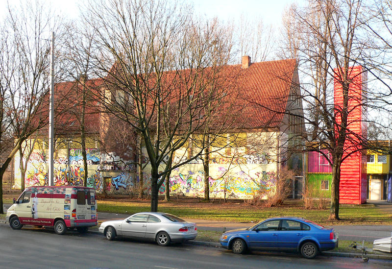 Hochbunker auf dem Welfenplatz in Hannover